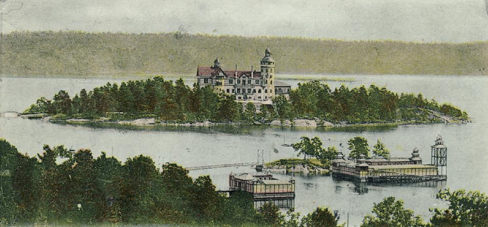 Saltsjöbaden, handkolorerat vykort, omkring år 1900.